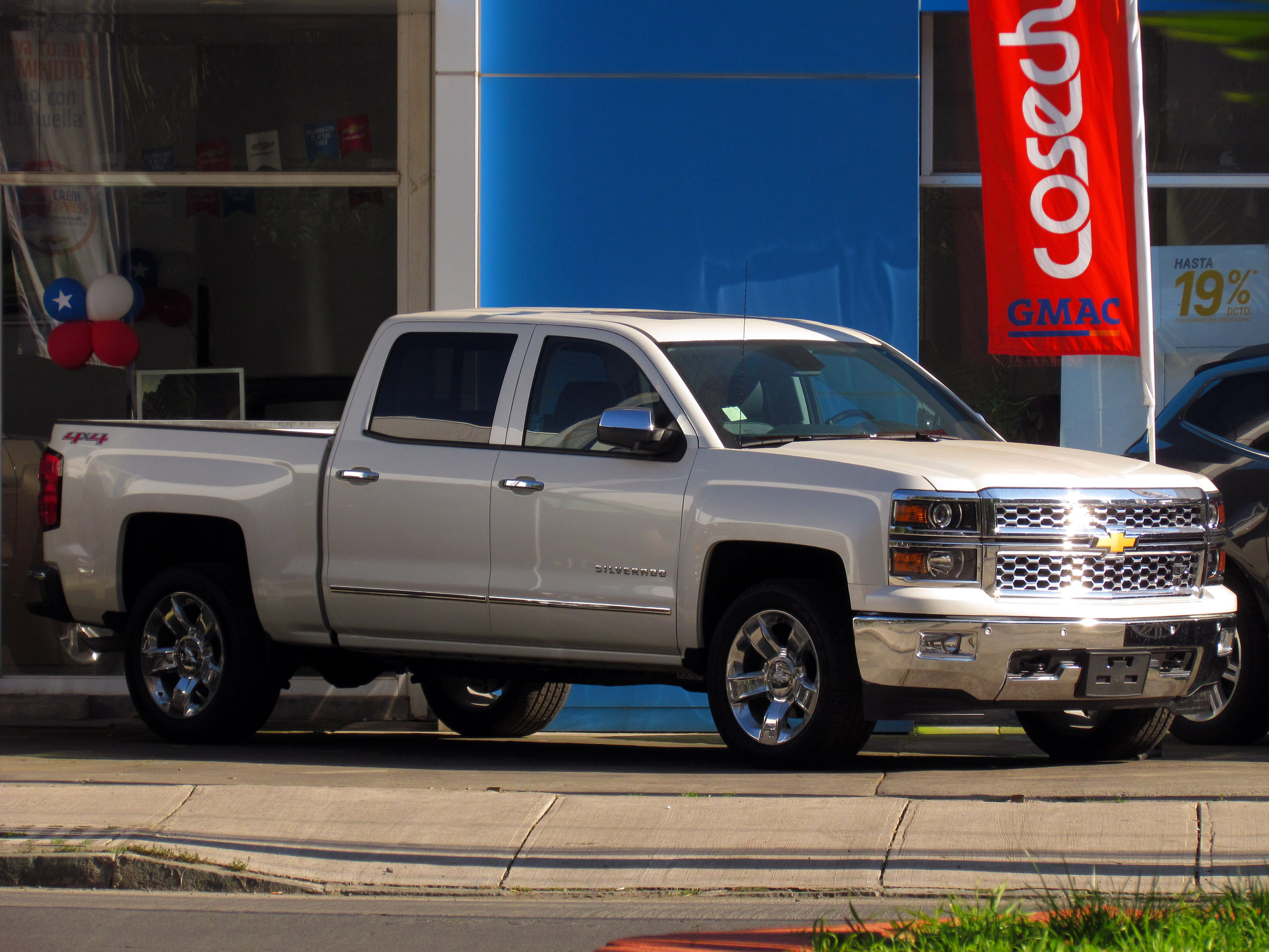 Chevrolet Silverado LTZ Crew Cab 4x4 2014